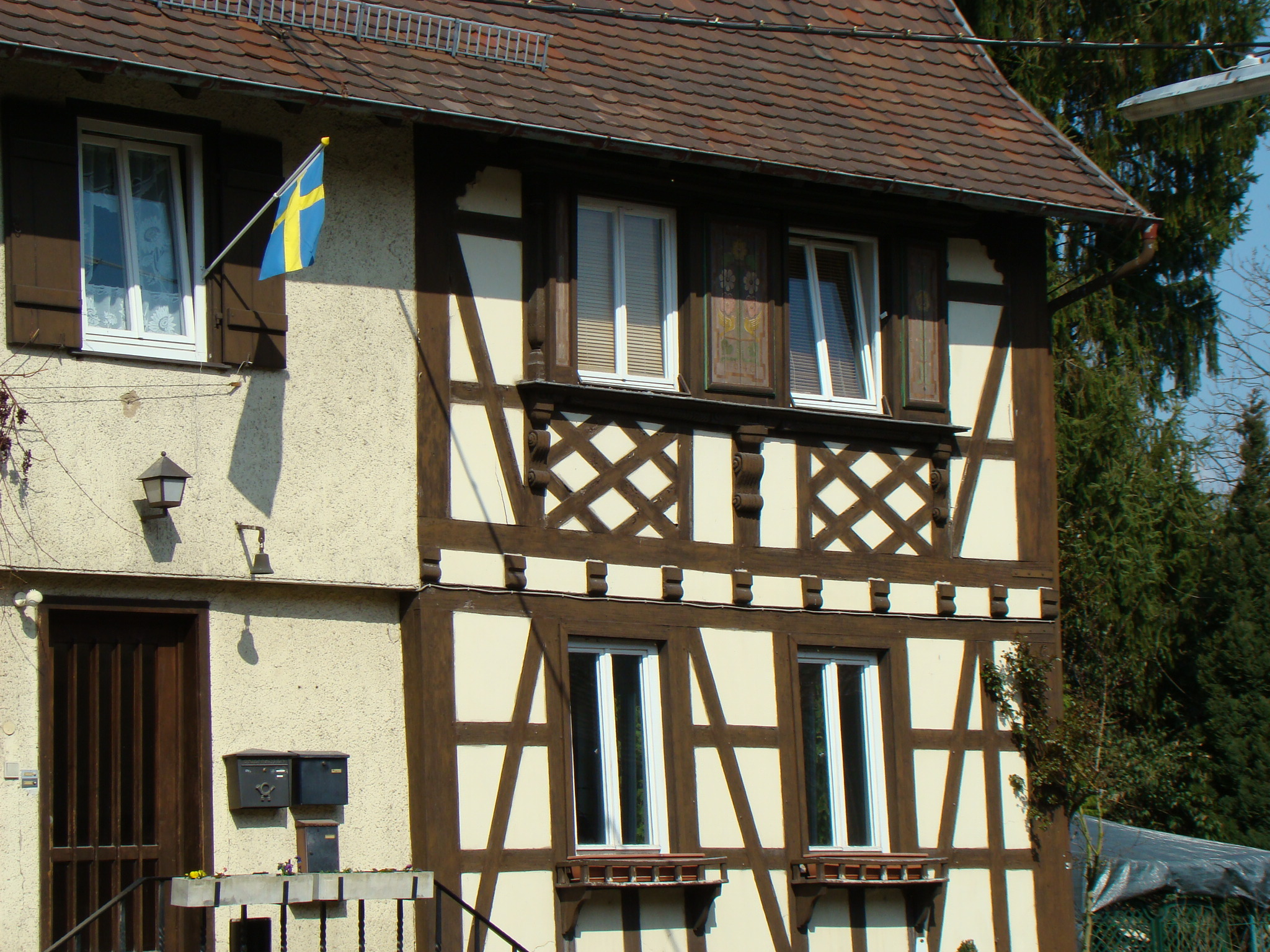 Altböllinger Hof in Heilbronn-Neckargartach